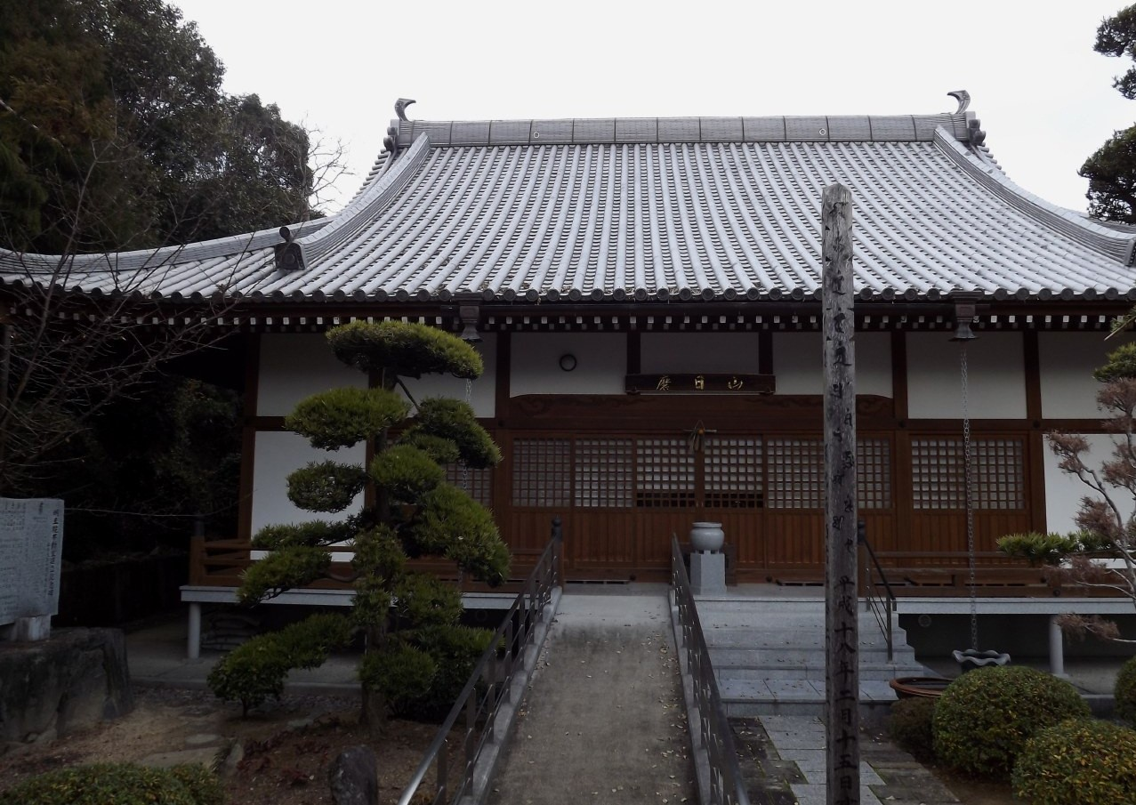 明王院の持仏堂